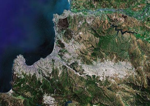 Fotografia Satelital